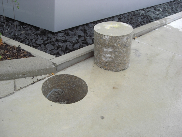 300 mm Kernbohrung in Betonboden